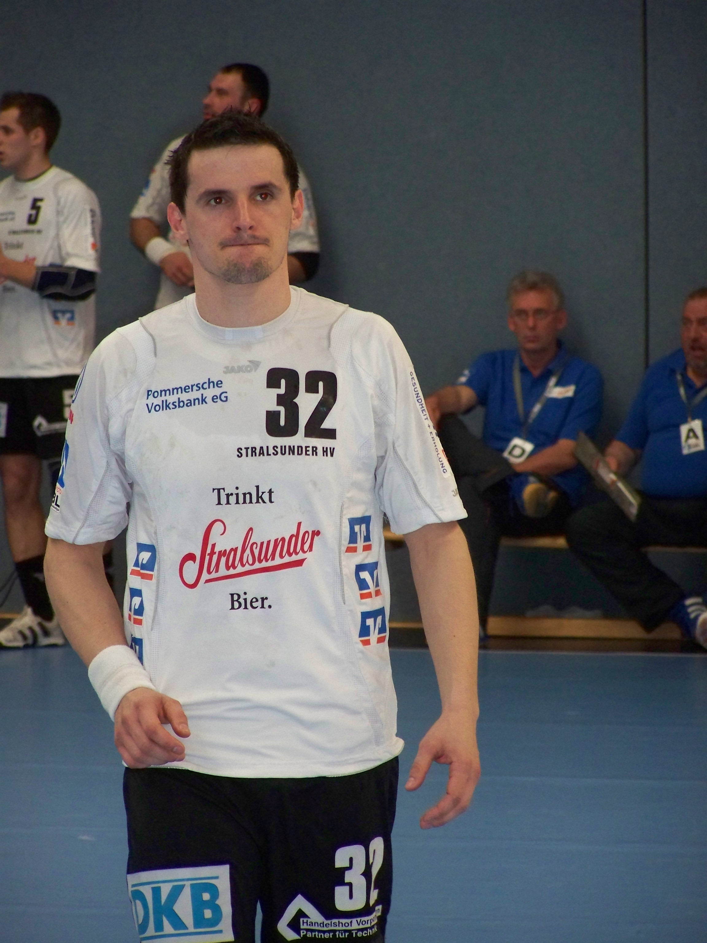 Der kroatische Handballspieler Ivan Ninčević vom Stralsunder HV beim Bundesliga-Spiel gegen den de.MT Melsungen am 4. April 2009.